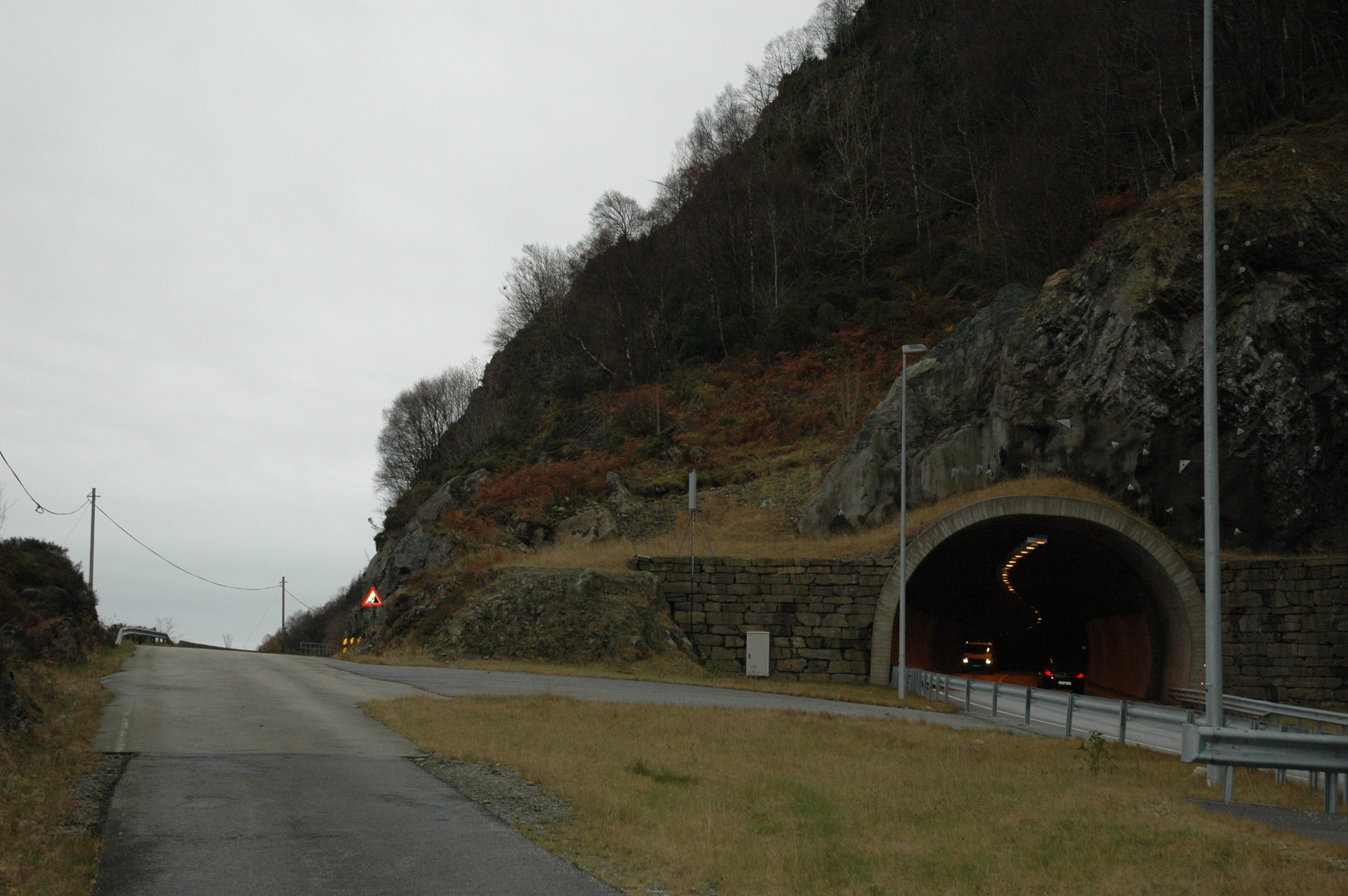 Uføretunnelen, E39 Stord